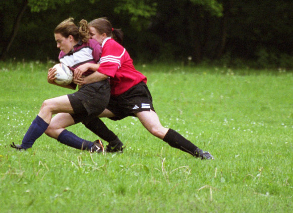 Das Bild zeigt eine typisches Tackling, das ist eine Aktion im Rugby